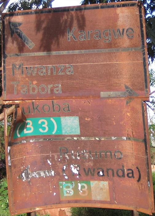 Road sign in Ngara, Tanzania